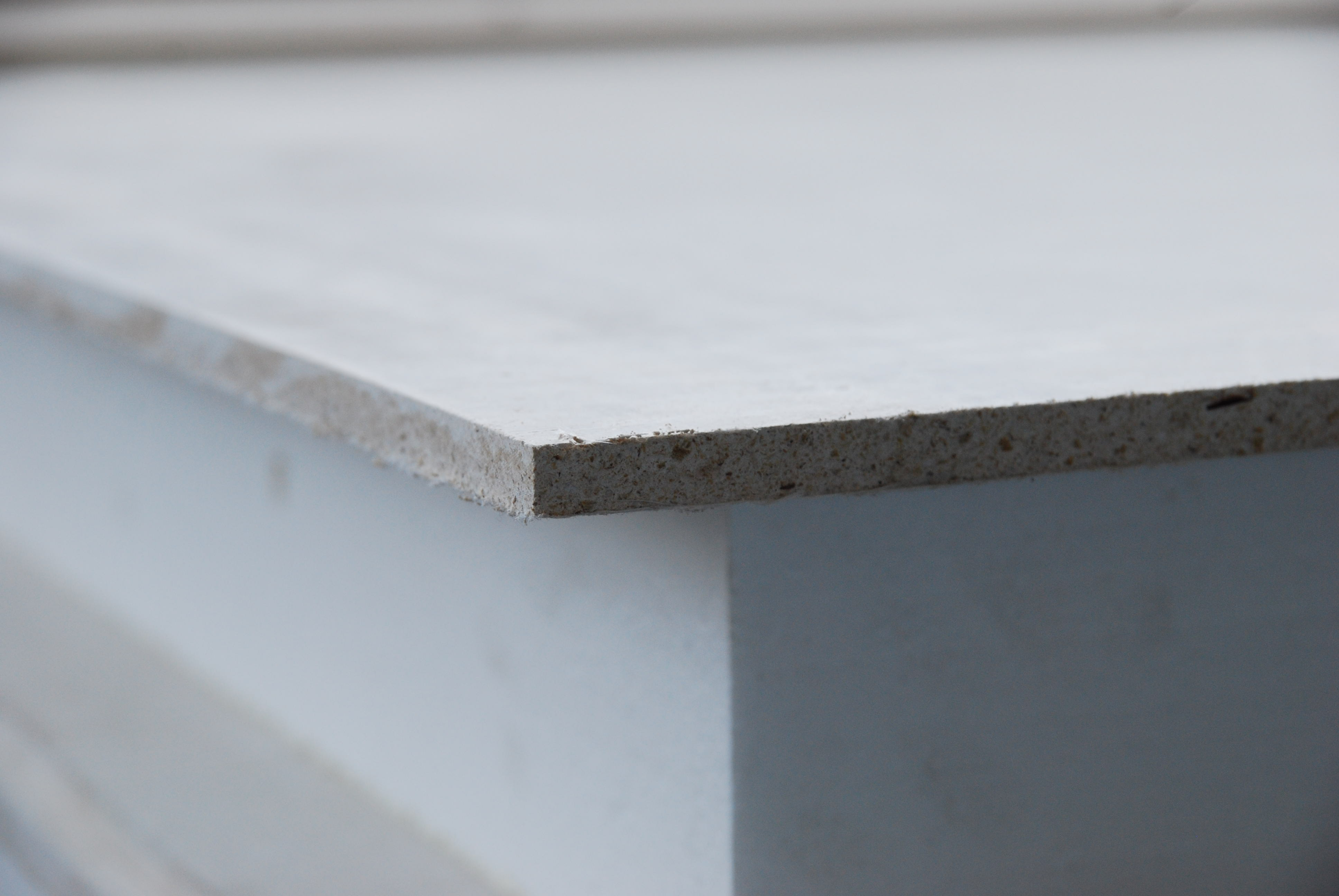 Pięciowarstwowy panel MgO Green z dwiema warstwami płyt MgO